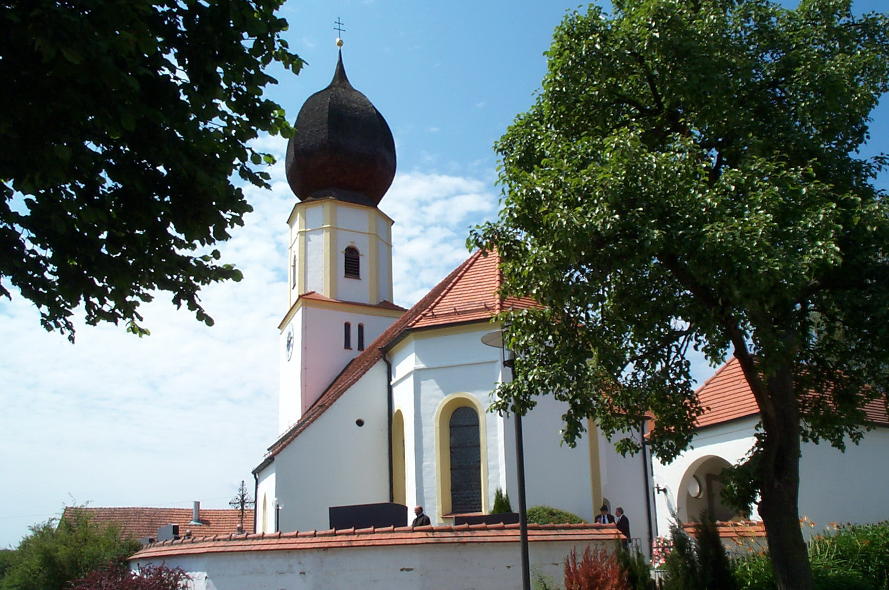 Herrngiersdorf, Semerskirchen, Am See 1. Katholische Pfarrkirche Mariä Himmelfahrt. Saalkirche mit Satteldach und eingezogenem, fünfseitig geschlossenem Chor. Westturm mit mächtiger Zwiebelhaube, Langhausmauern und Turmunterbau im Kern mittelalterlich. Chor spätgotisch, Ausbau der Kirche im 17./18. Jahrhundert; mit Ausstattung. Kirchhofmauer, 18./19. Jahrhundert. Ansicht von Osten.